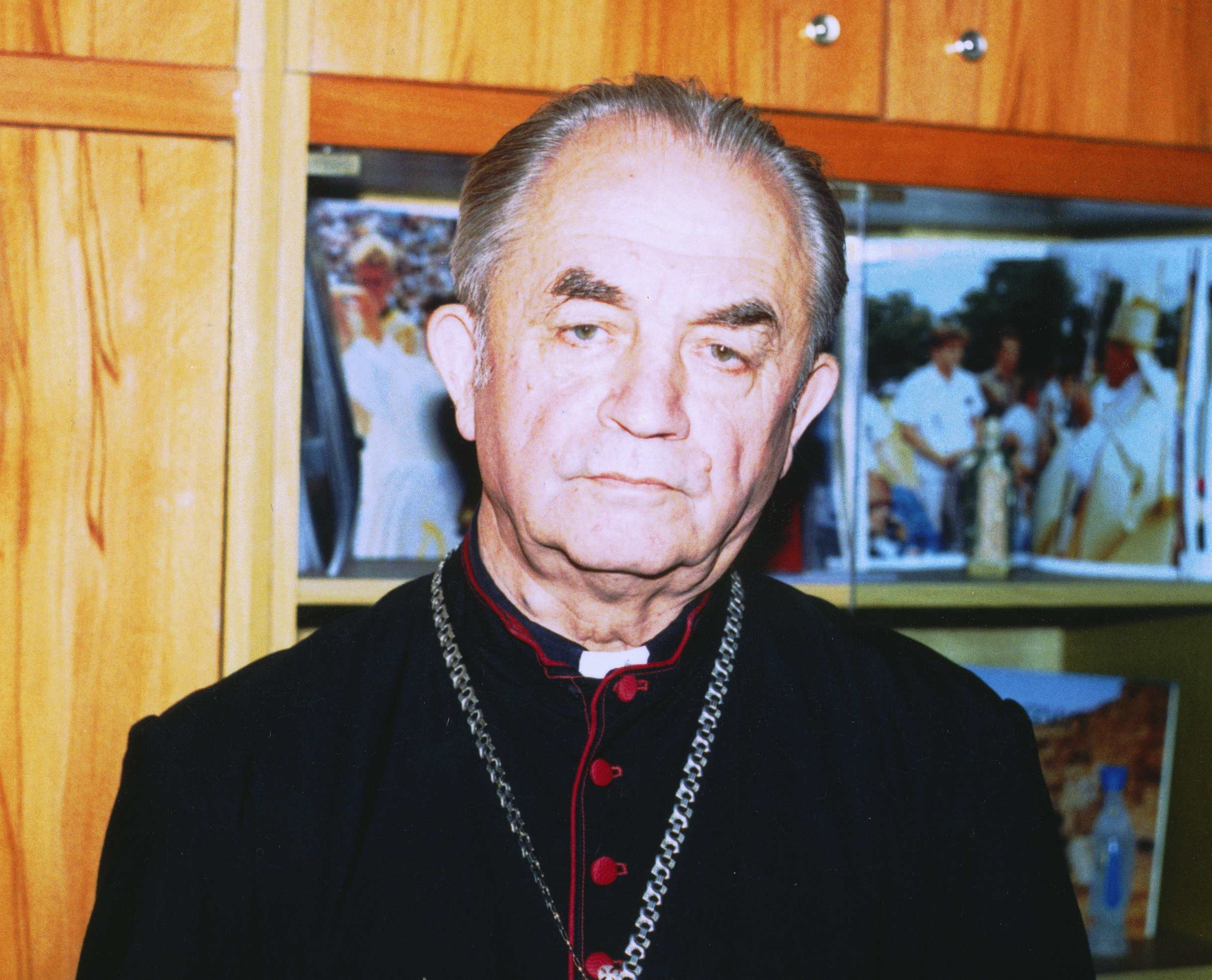 Иоанн Семедій у 1996 році. Photo taken by Jozafát Vladimír Timkovič, OSBM